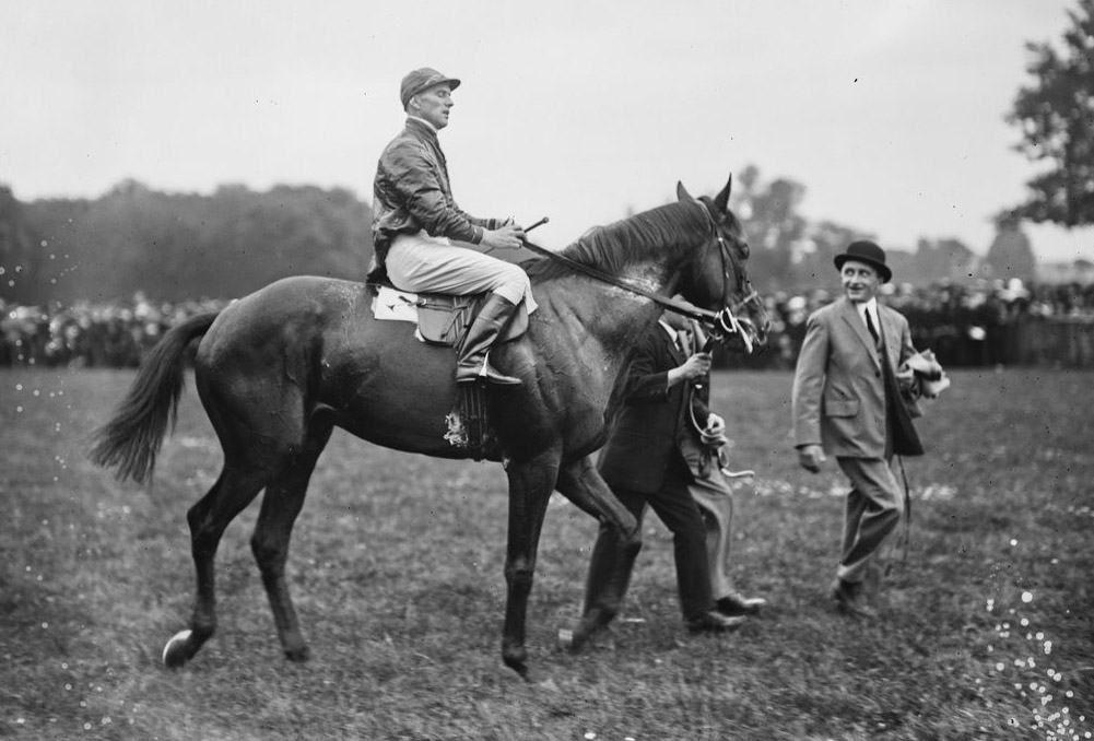 Le Capucin